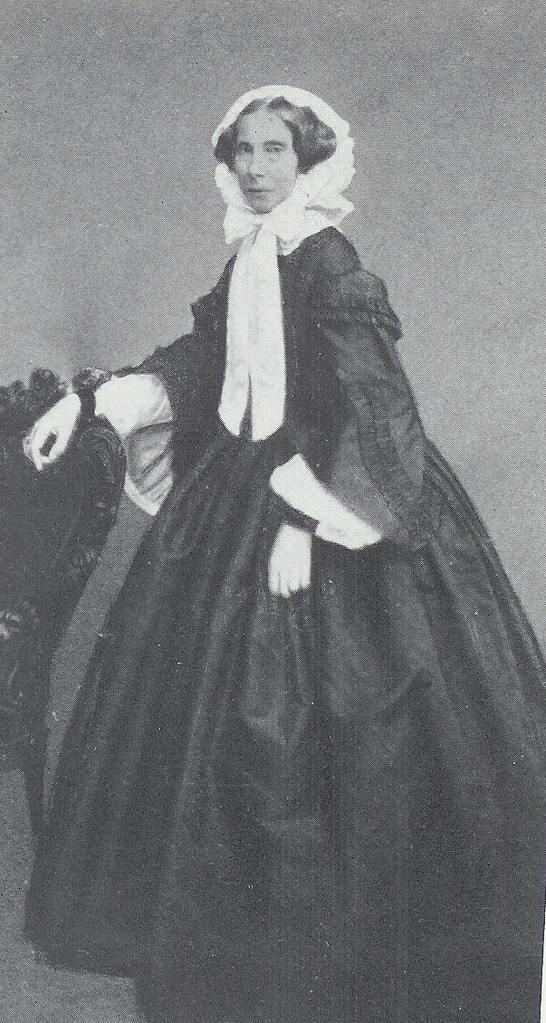 Foto van prinses Louise van Pruisen (overleden 1871).